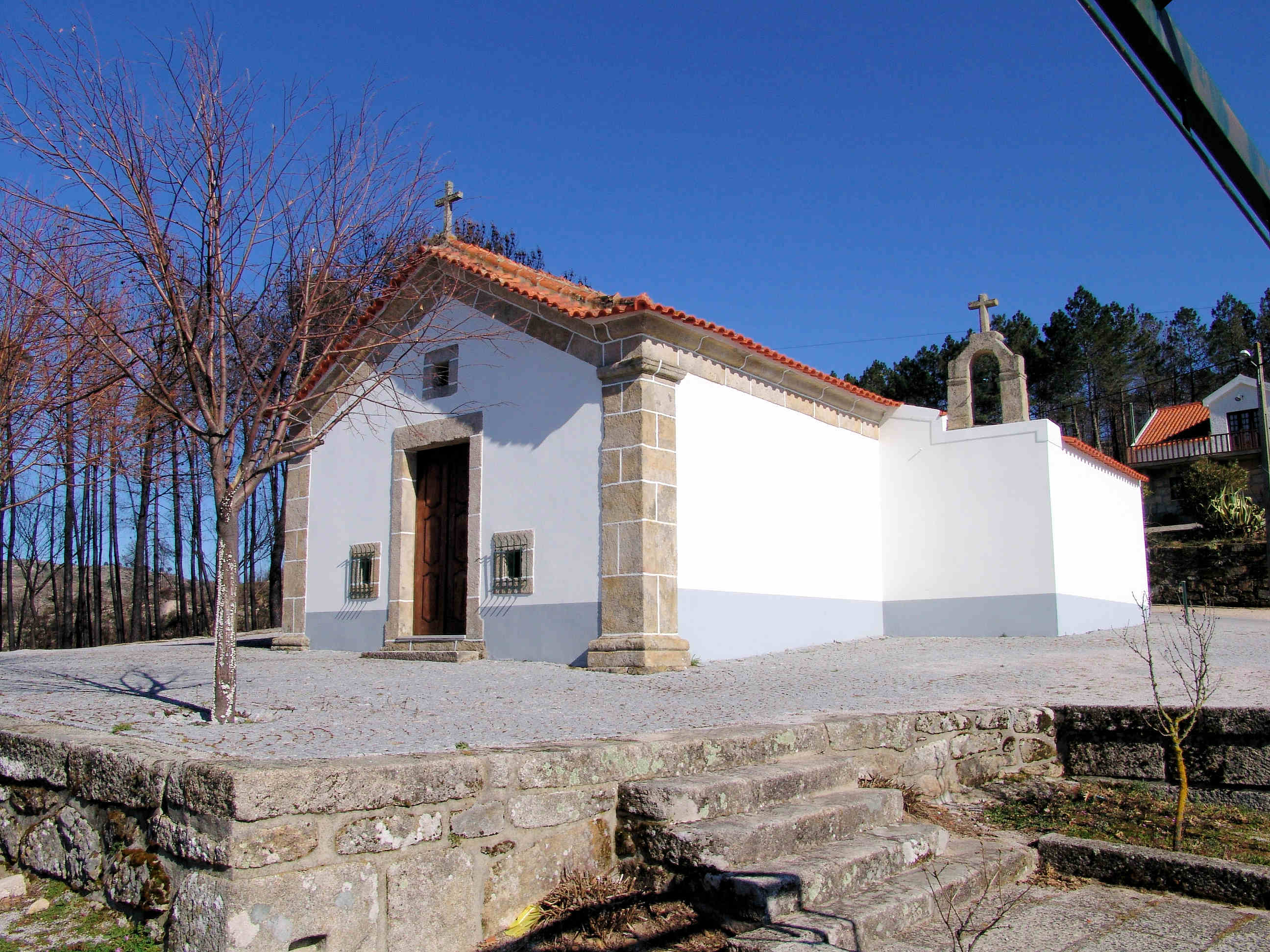 Capela de Nossa Senhora do Carmo. Autor: Carlos Almeida Origem: Fuínhas